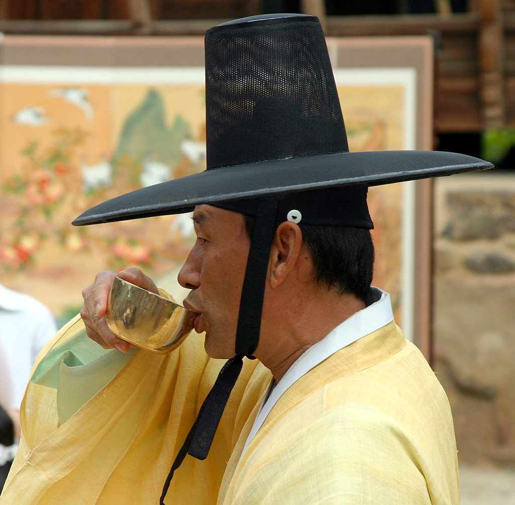 Hahoe Folk Village in Andong, Gyeongsangbuk-do, South Korea.